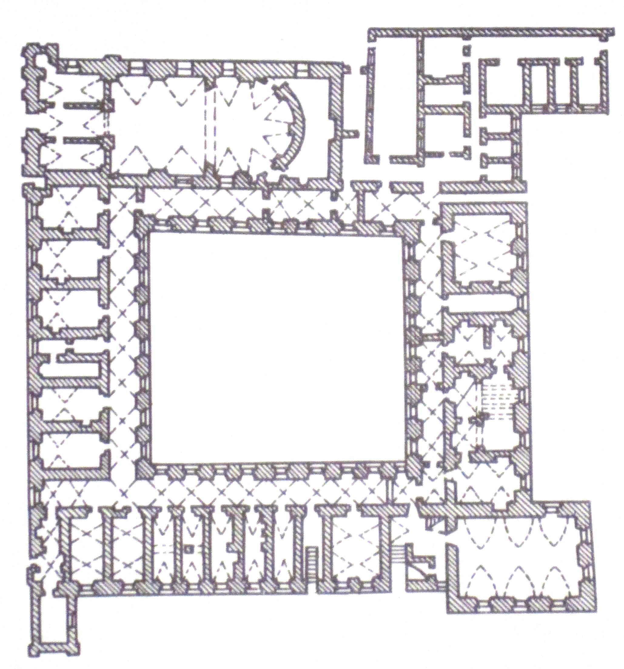 Плян кляштара брыгітак у Гродна